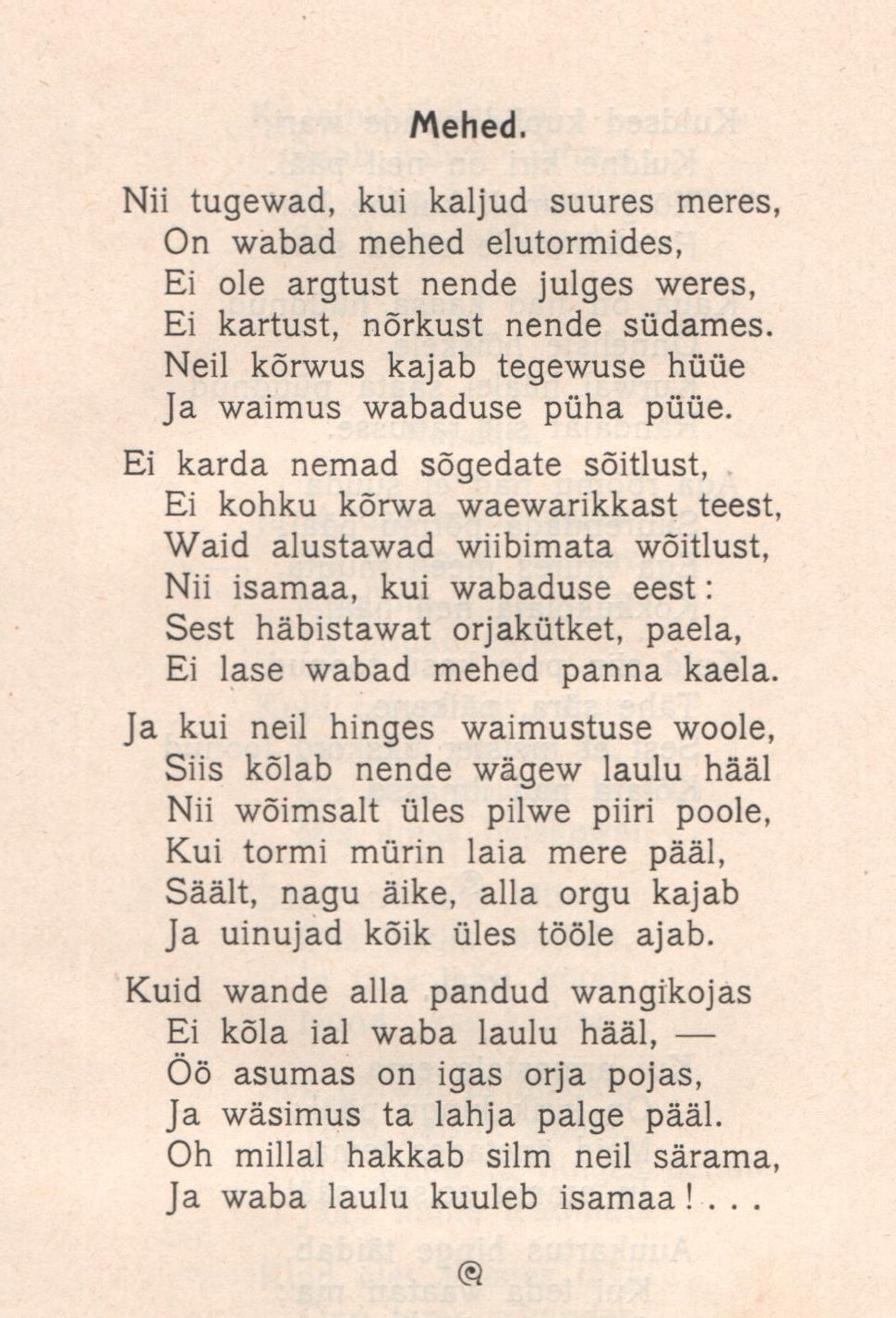 Jakob Liivi luuletuse "Mehed" tekst 1906. aasta väljaandes